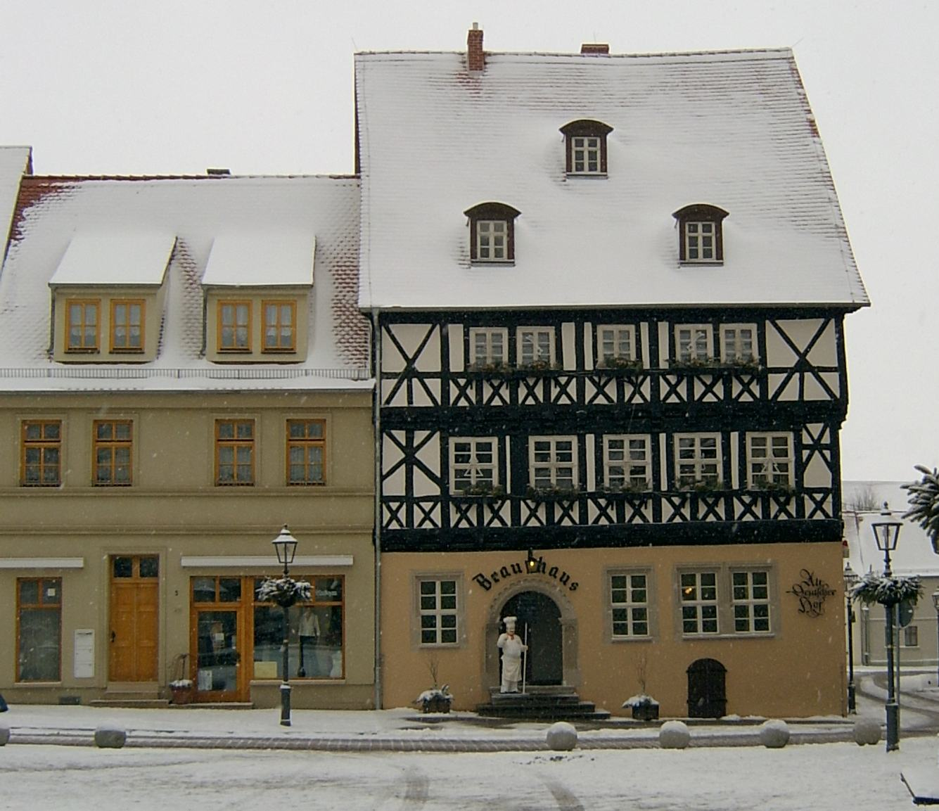 Gaststätte Brauhaus (Altdeutscher Hof) in Köthen (Anhalt).